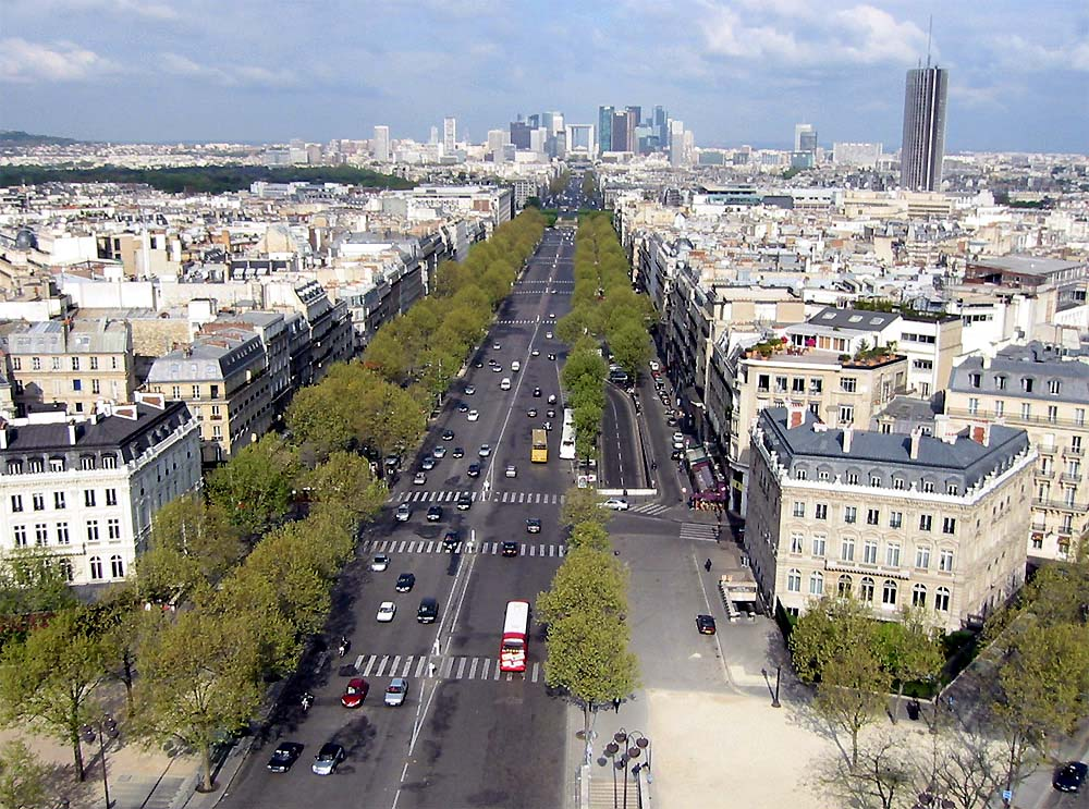 Blick vom Arc de Triomphe Ã¼ber Avenue de la Grande Armée nach La Defense. FrÃ¼hjahr 2002, selbst fotografiert